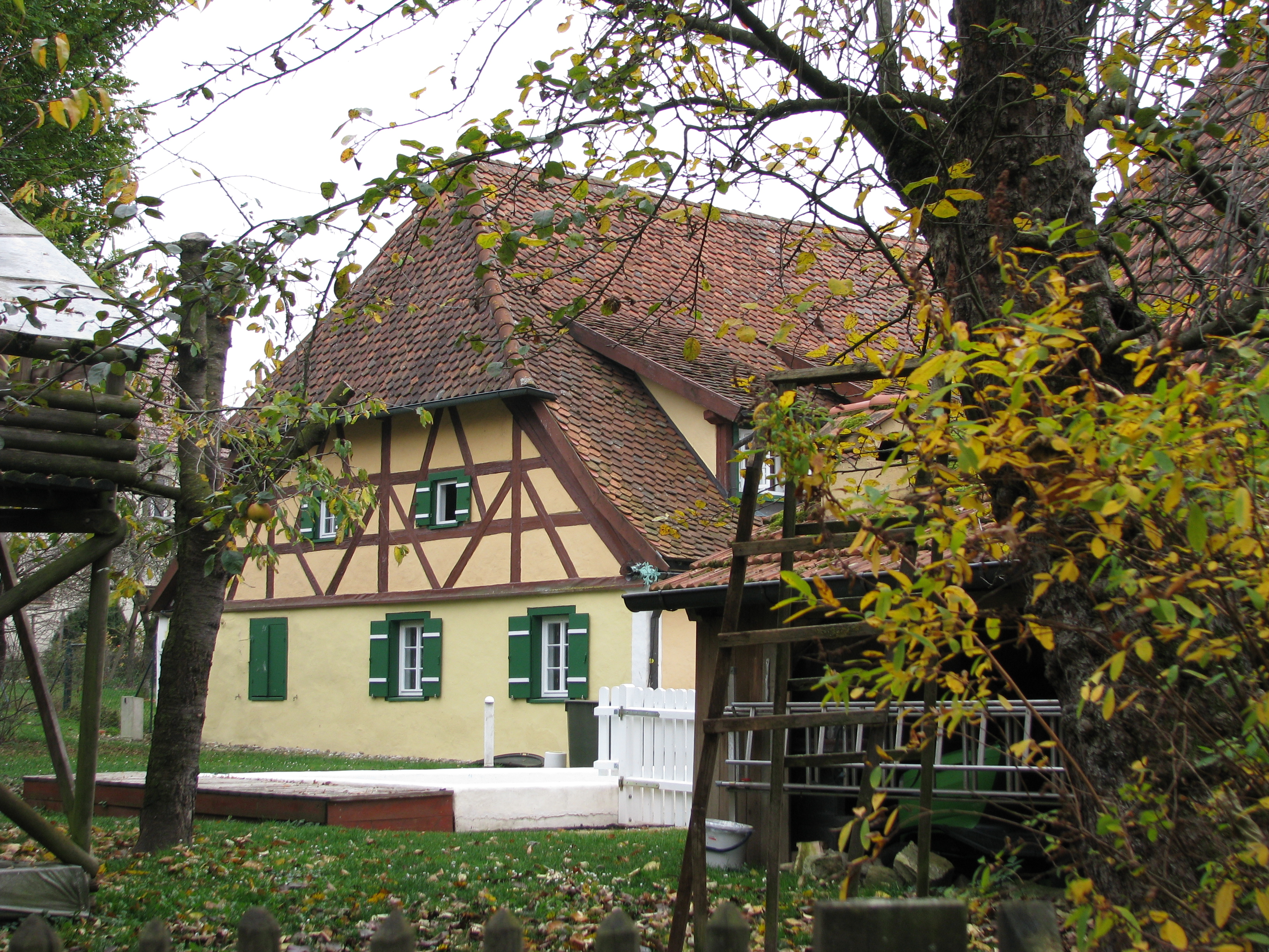 Körnersdorf, Ortsteil von Mühlhausen im Landkreis Neumarkt in der Oberpfalz, Fachwerkgebäude